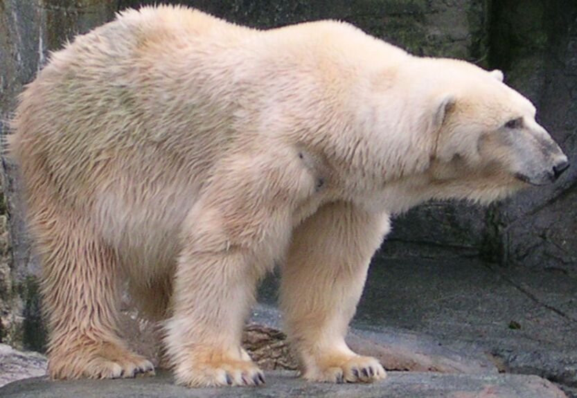 Billede taget af en af isbjørnene i Københavns Zoologiske have den 24. November 2002 af BrianHansen Har gjort billedet lidt mindre i omfang og størrelse. BrianHansen